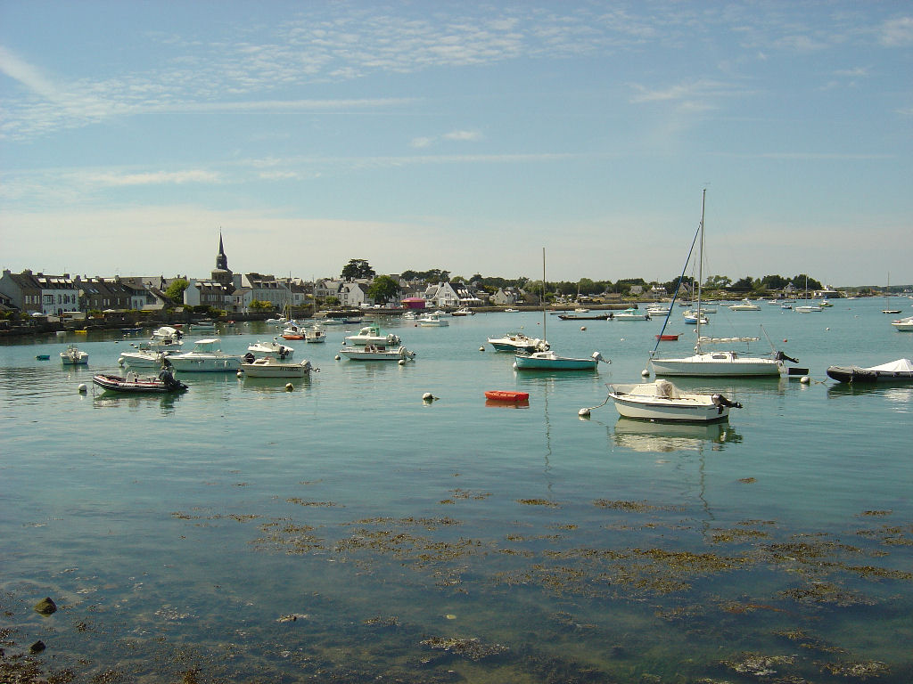 Vue générale du port de Locmariaquer